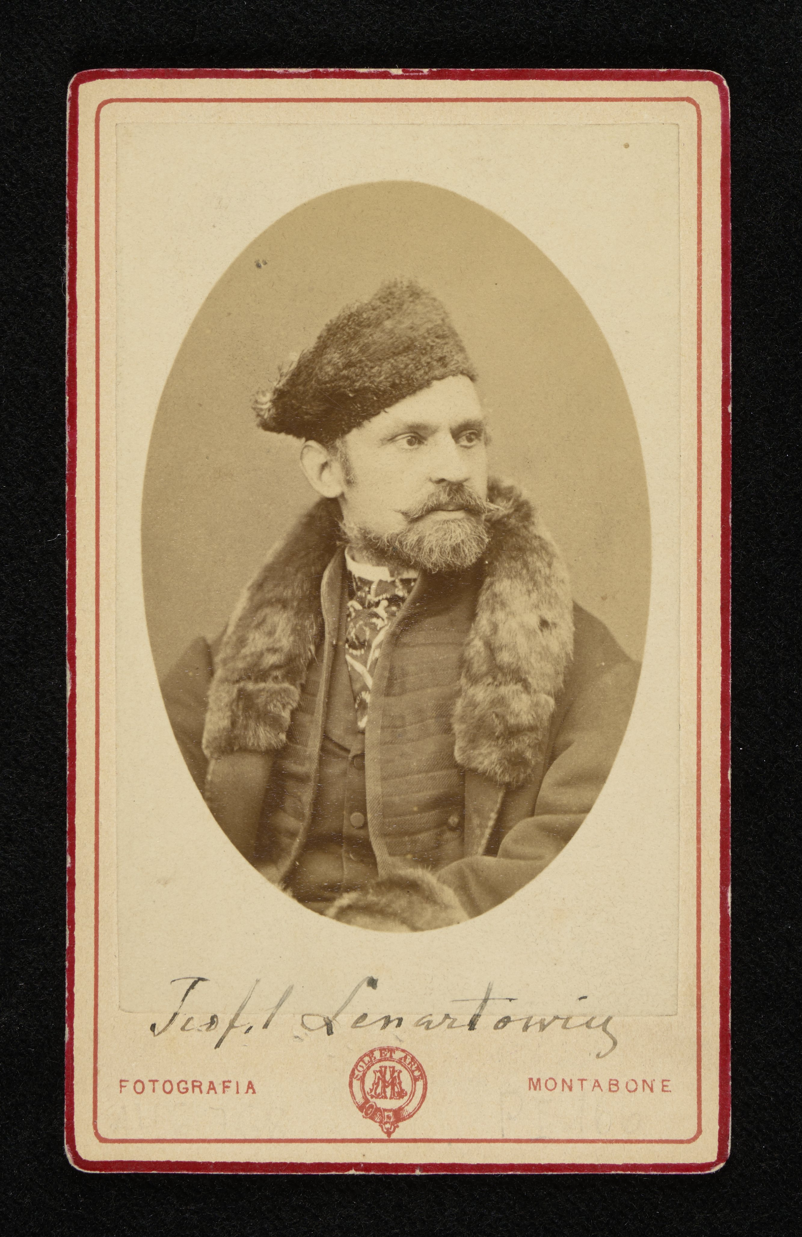 Teofil Lenartowicz w futrzanej czapce